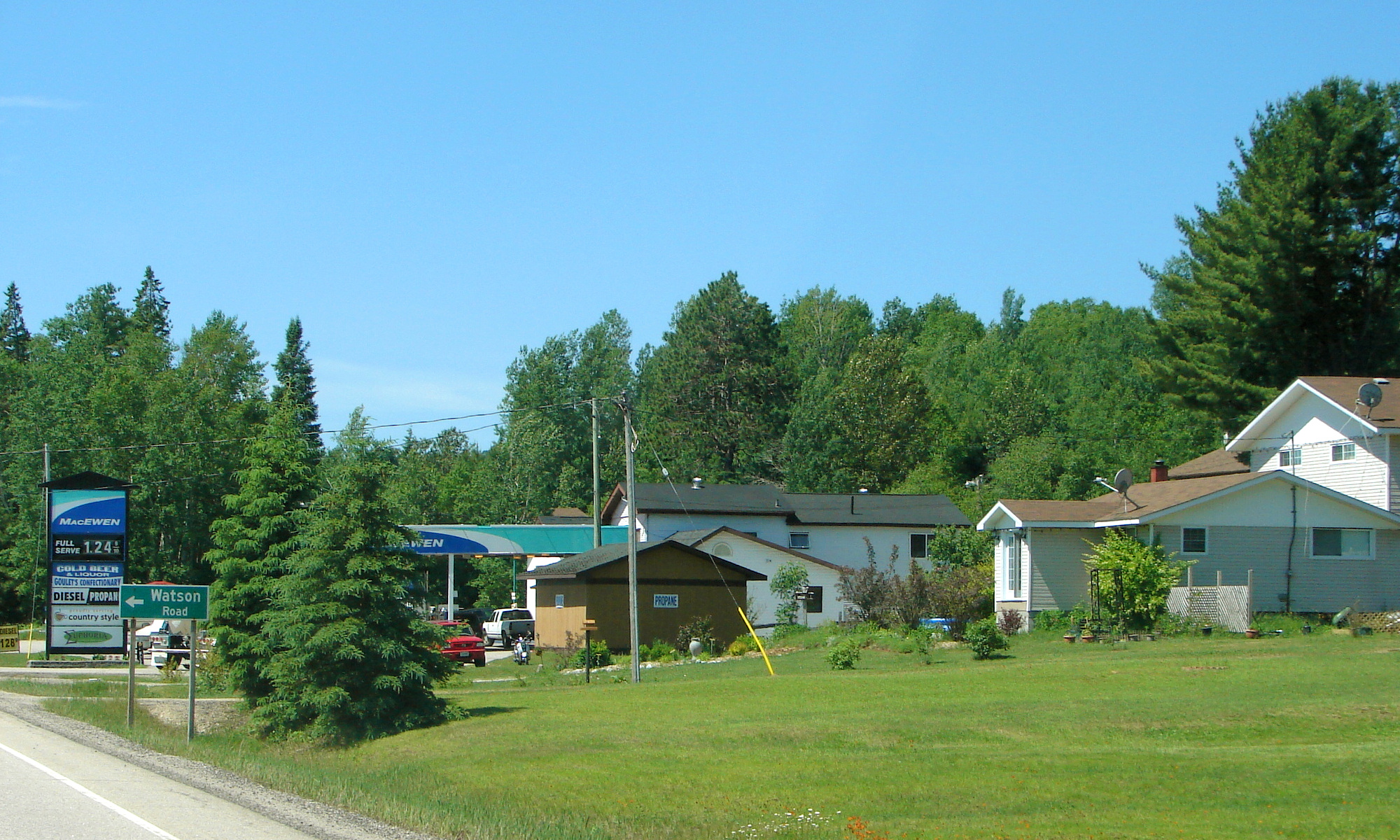 Eldee, Ontario, Canada